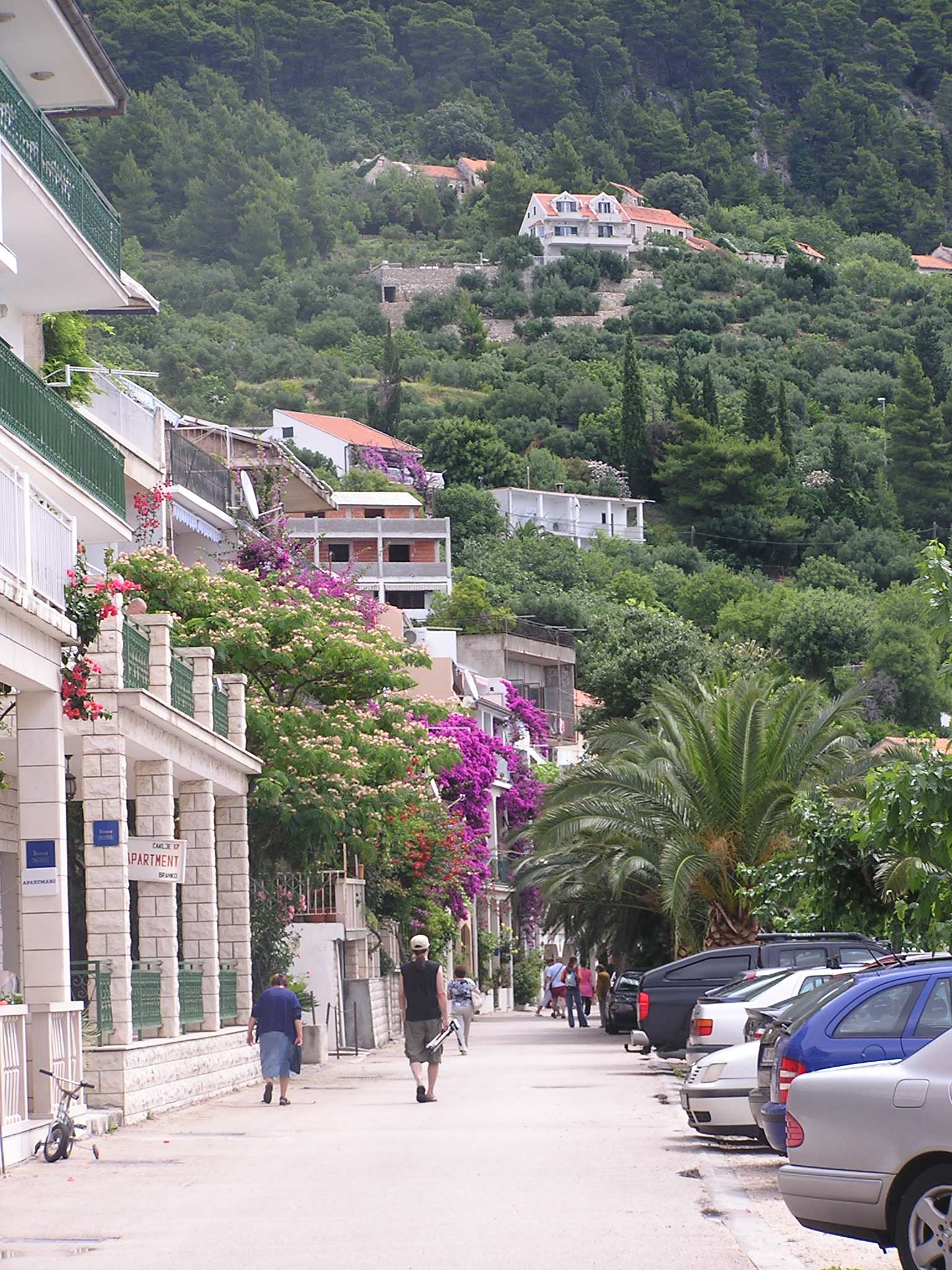 Na této fotografii je hlavní ulice Čaklje v pohledu zhruba ze středu městečka.